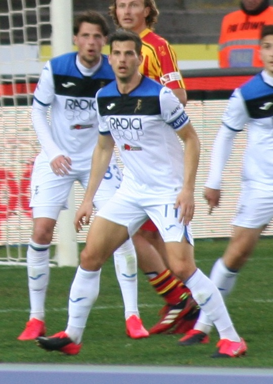 Azione di attacco del Lecce contro l'Atalanta, nella partita disputata allo Stadio di Via del Mare di Lecce il 1° marzo 2020